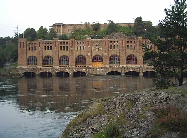 Olidan är ett av två vattenkraftverk i Trollhättan.